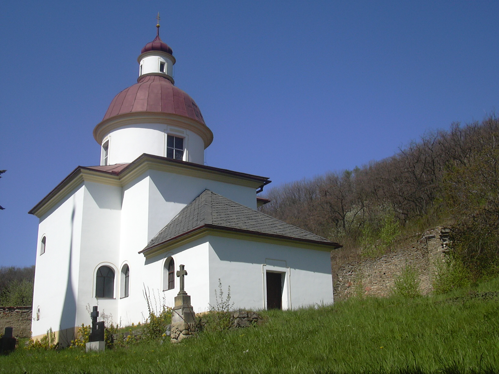 Pustiměř - rotunda (Vyškov District, Czech Republic)